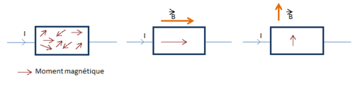 Ce schéma représente la variation des moments magnétiques dans un matériau ferromagnétique en fonction de l'orientation du champ appliqué